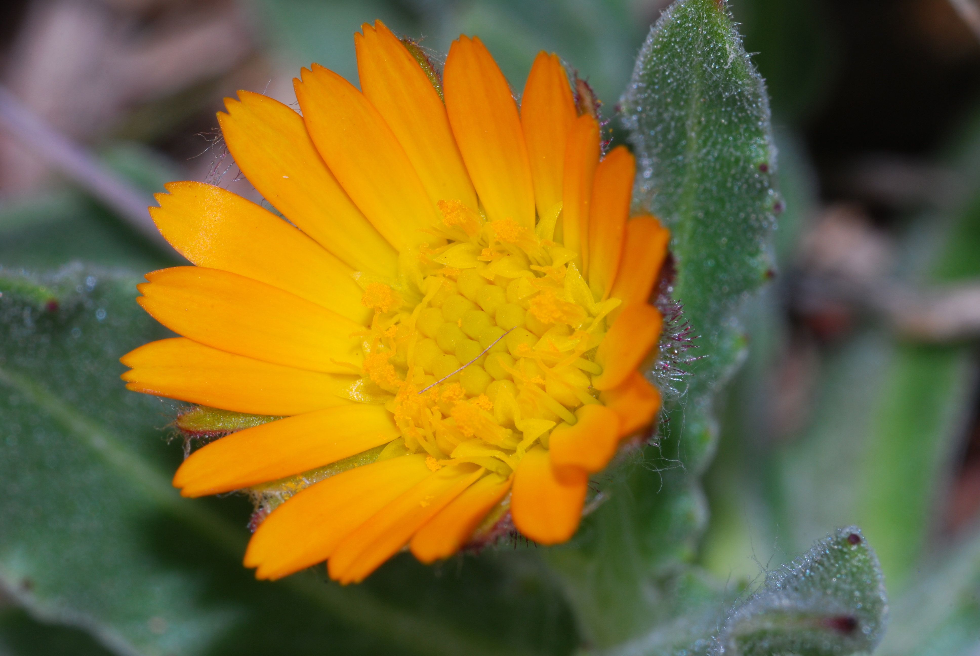 Octon, Hérault, FRANCE